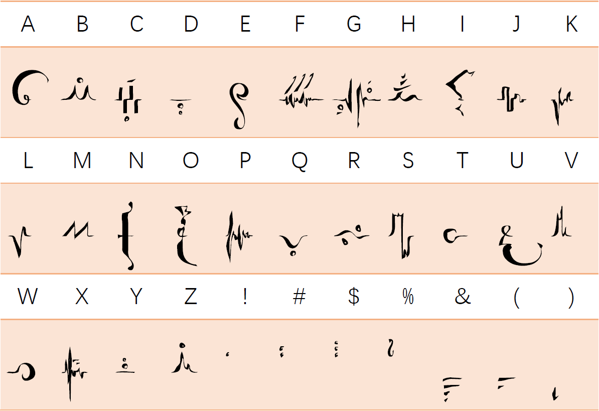 中文（中国大陆）: 星语字体下各字母的样子（包括分段星语在字体中使用的符号）